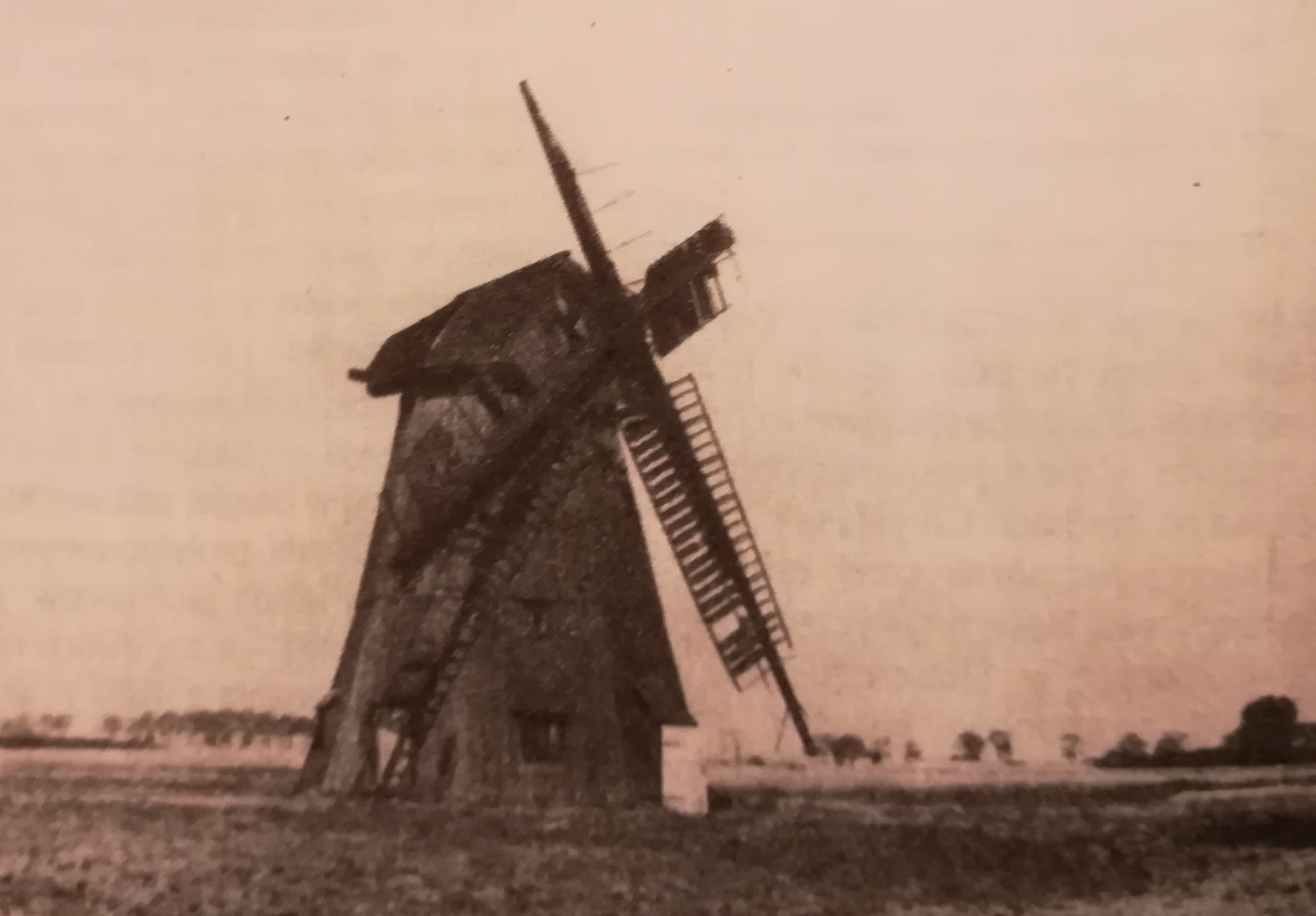 Wiatrak w Lichnowach na Żuławach.